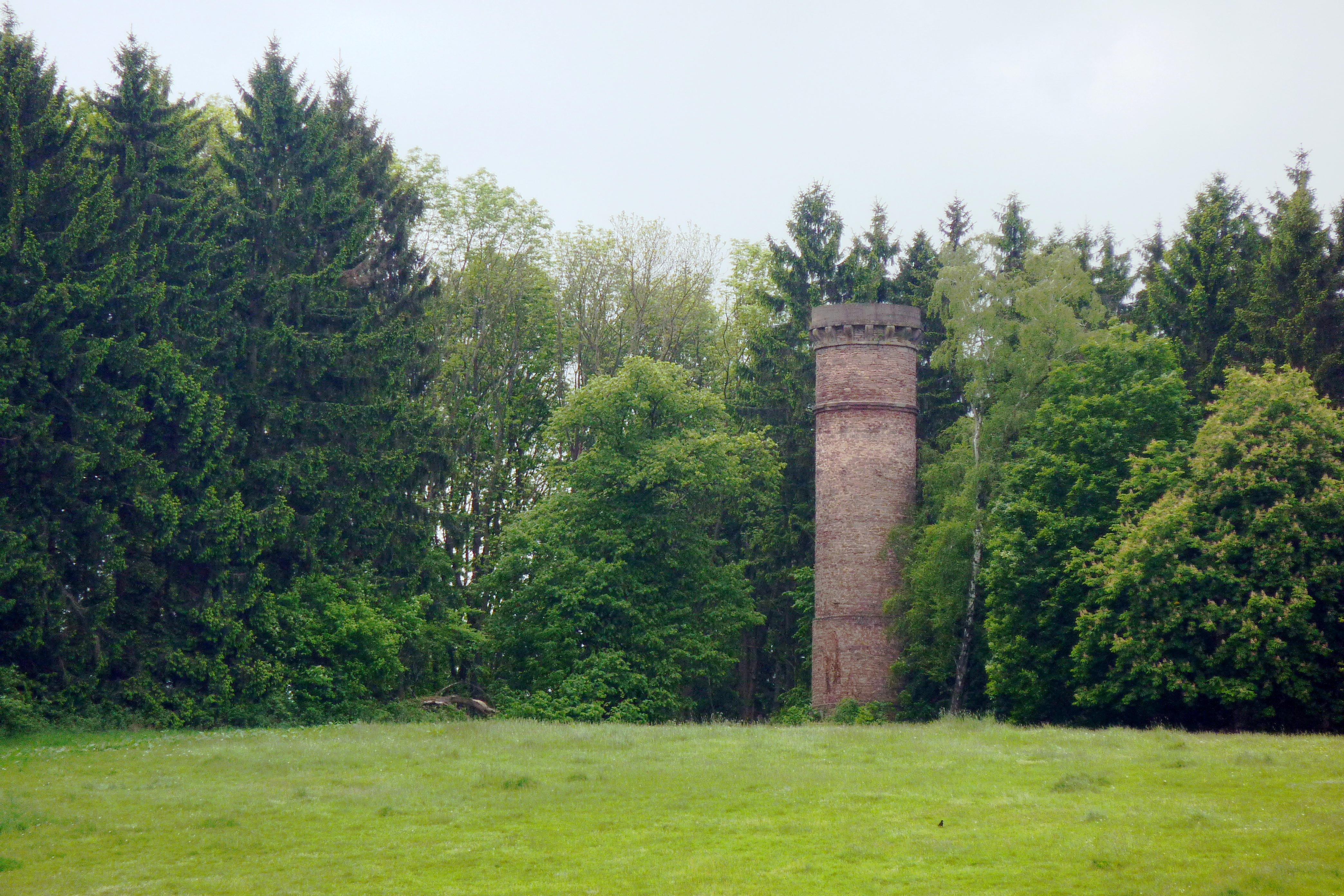 Hardenbergwarte auf dem Burgberg bei Nörten-Hardenberg, Landkreis Northeim, Südniedersachsen. Erbaut 1842 als Aussichtsturm